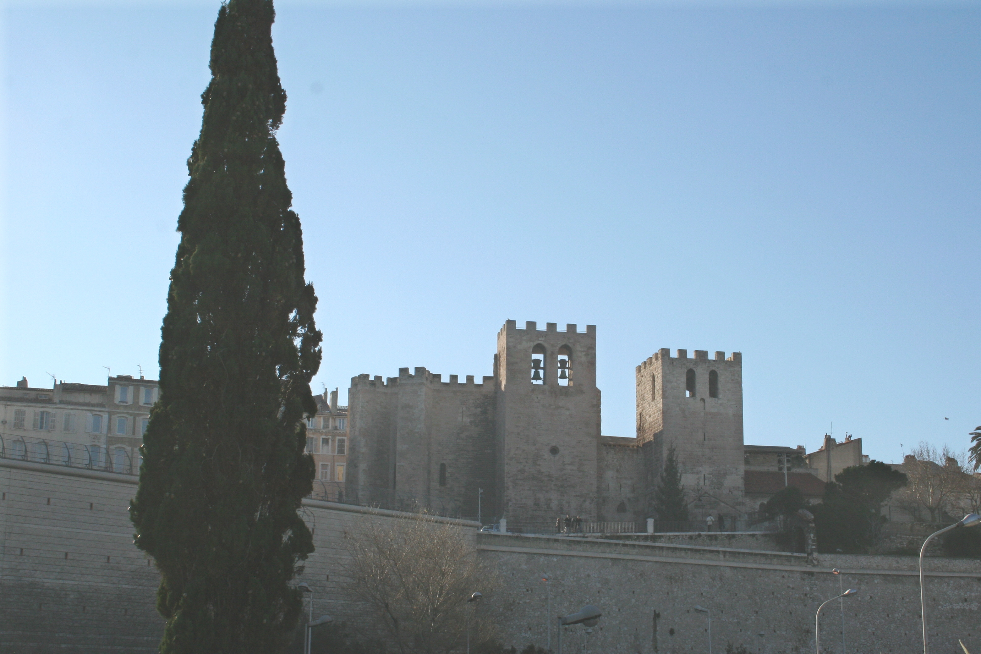 Vue globale de l'abbaye de Saint-Victor à Marseille